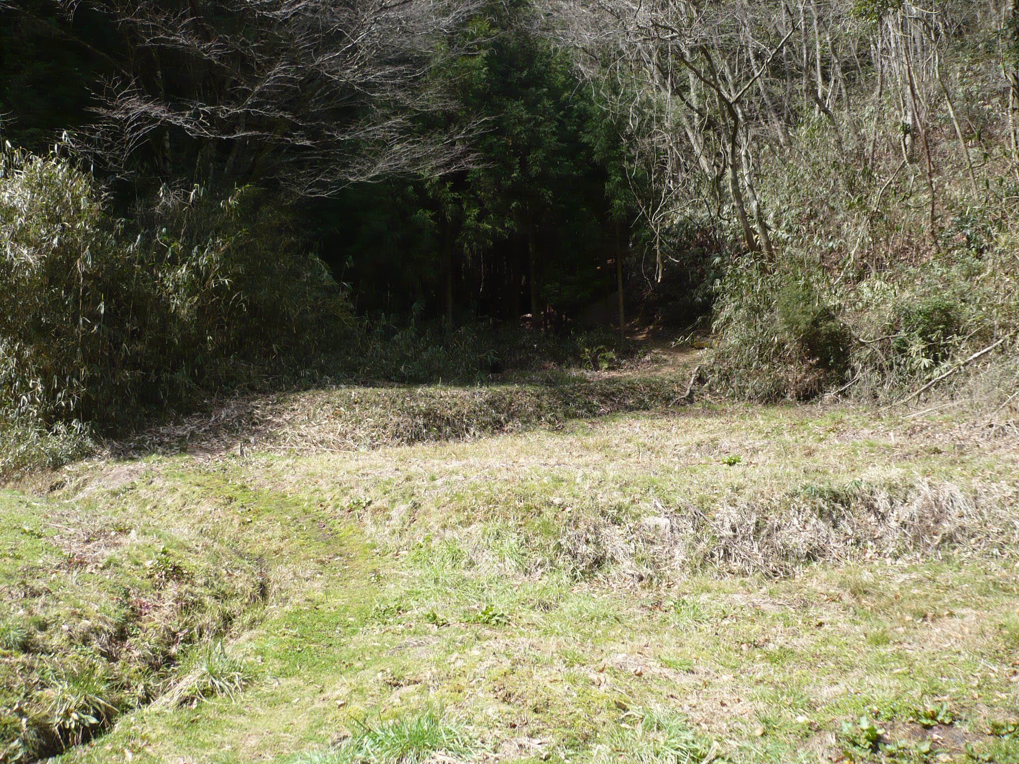 搦め手道